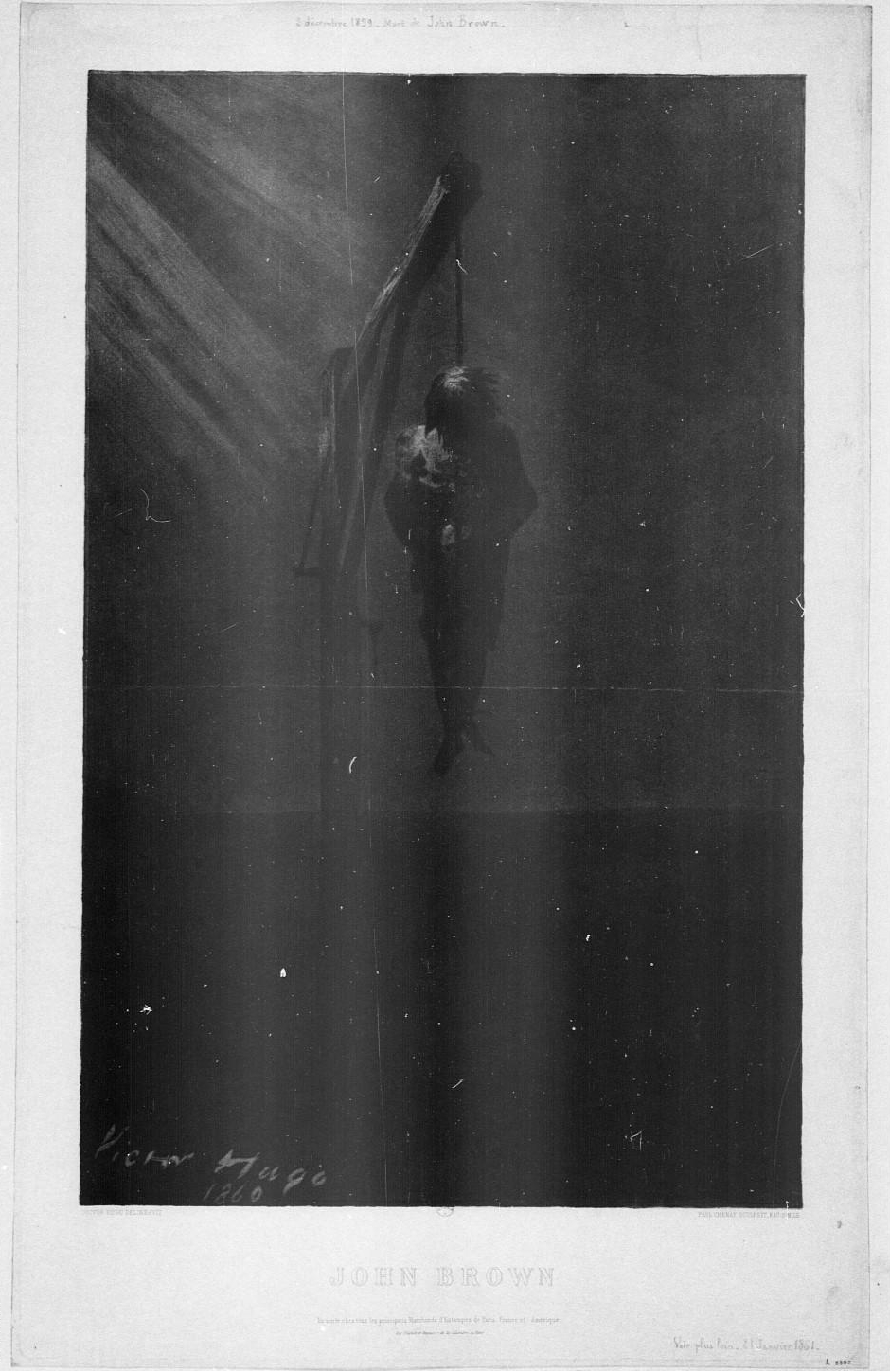 Titre : John Brown : [estampe] / Victor Hugo delineavit ; Paul Chenay sculpsit, fac-simile Auteur : Chenay, Paul (1818-1906). Graveur Auteur : Hugo, Victor (1802-1885). Dessinateur Éditeur : Imprimerie Gilquin et Dupain (Paris) Date d'édition : 1861 Sujet : Brown, John (1800-1859)